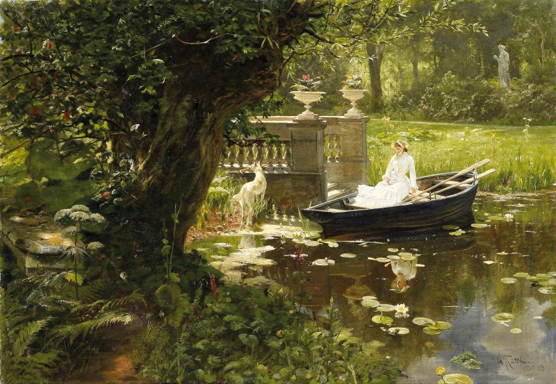 Im Düsseldorfer Hofgarten. Signiert und datiert unten rechts: G. Marx Df. 83. Öl auf Leinwand. 58 x 85cm.